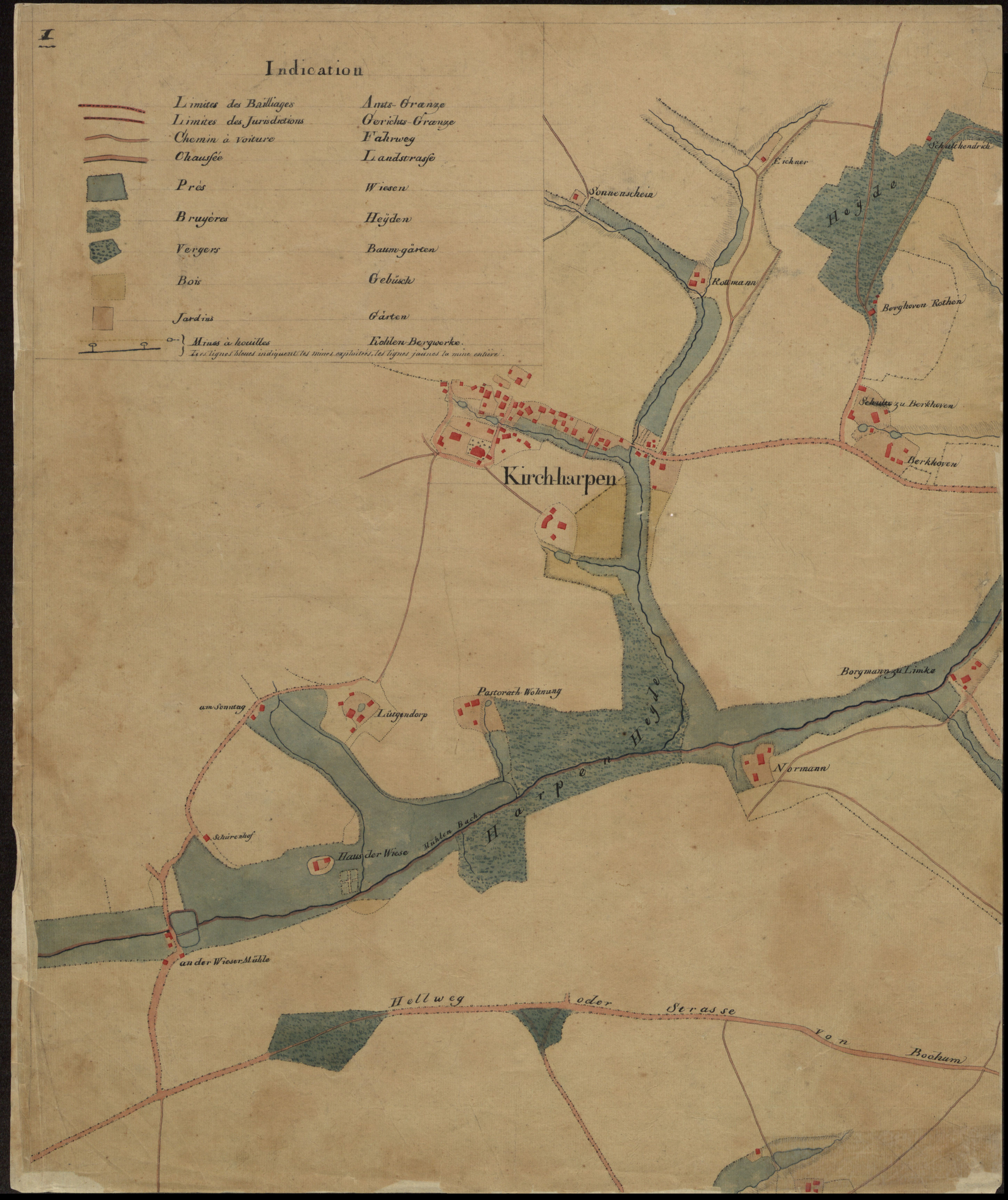 Spezialkarte des östlichen Distrikts Hörde Nachdruck als „Carte speciale des mines“.